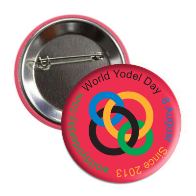 노랑과 검정의 위치를 변경